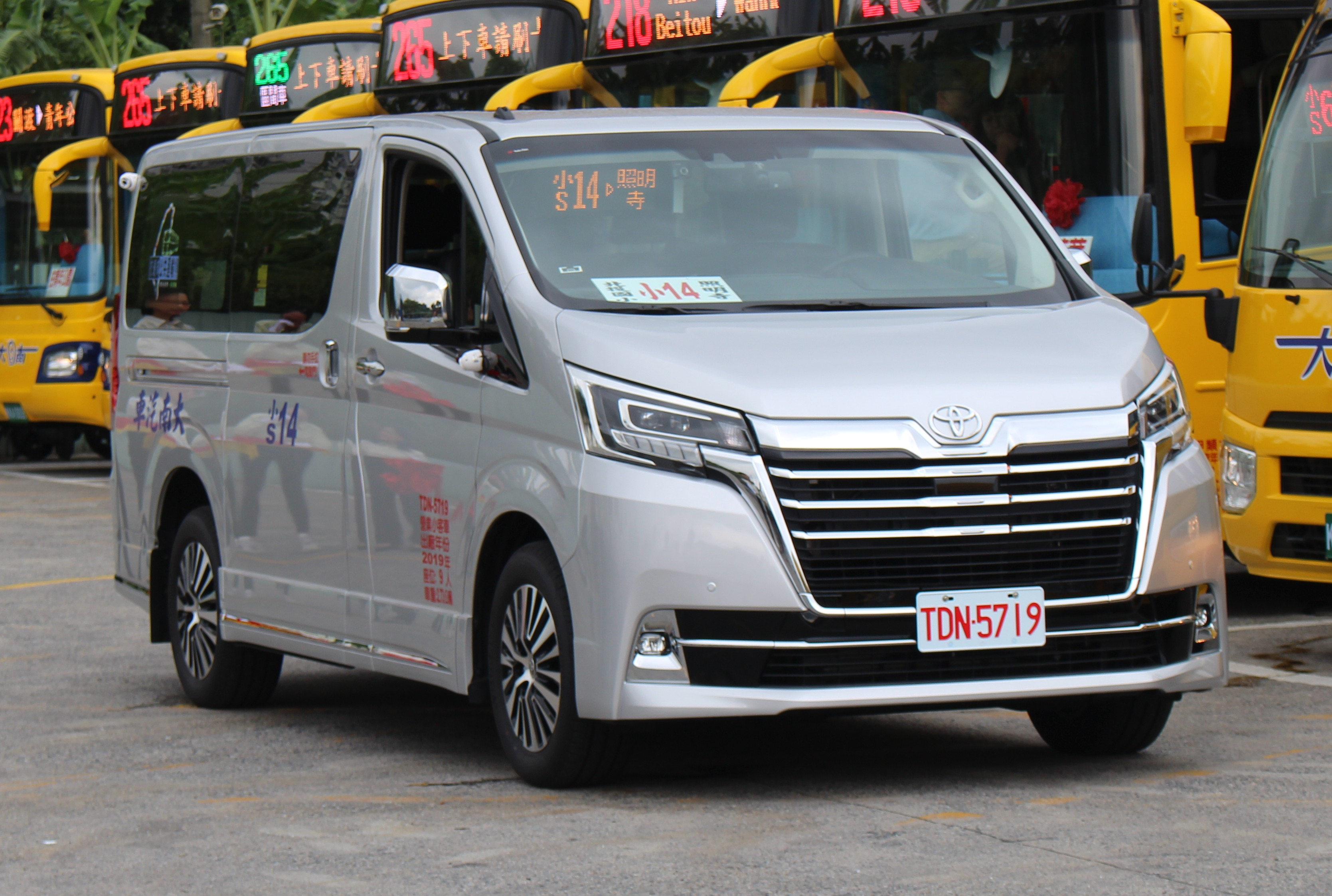 中文（台灣）: 大南汽車2019年豐田GRANVIA廂型車TDN-5719，行駛小14線。